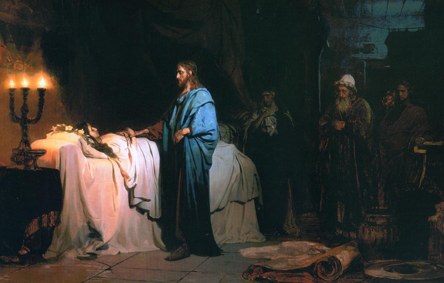 13 февраля 1871 года пятерым выпускникам Академии художеств была задан одна общая тема: «Воскрешение дочери Иаира». По академическим правилам каждый из них не ведая, что делает другой, должен был исполнить эскиз. В тот же день эти работы были одобрены и утверждены Советом Академии. В дальнейшем Репиным были выполнены ещё семь эскизов проработки этой темы, которые до нашего времени сохранились в различных музеях и частных собраниях. На одном из них изображена девушка, написанная с Веры Шевцовой, словно погружённая в глубокий сон. Вместо чуда воскрешения у Репина зазвучала тема скорби. Со слов Репина он находился под впечатлением воспоминаний о смерти двенадцатилетней старше сестры Усти, что заставило его по новому, взглянуть на всю сцену. Здесь живая жизненная драма, не только пережитого им ужасного горя, но и многозначного смысла евангельского повествования, в основе которого – преодоление смерти и возрождение жизни хотя бы на полотне картины. Свет, цветовые созвучия наполняют картину почти музыкальным звучанием – во время работы над картиной Илья просил брата Василия играть одну из сонат Бетховена. Скорбь и просветлённость, трагедия и надежда положены в основу дипломной работы. Все пятеро выпускников за свои работы получили золотые медали и право быть пансионерами в Европе.